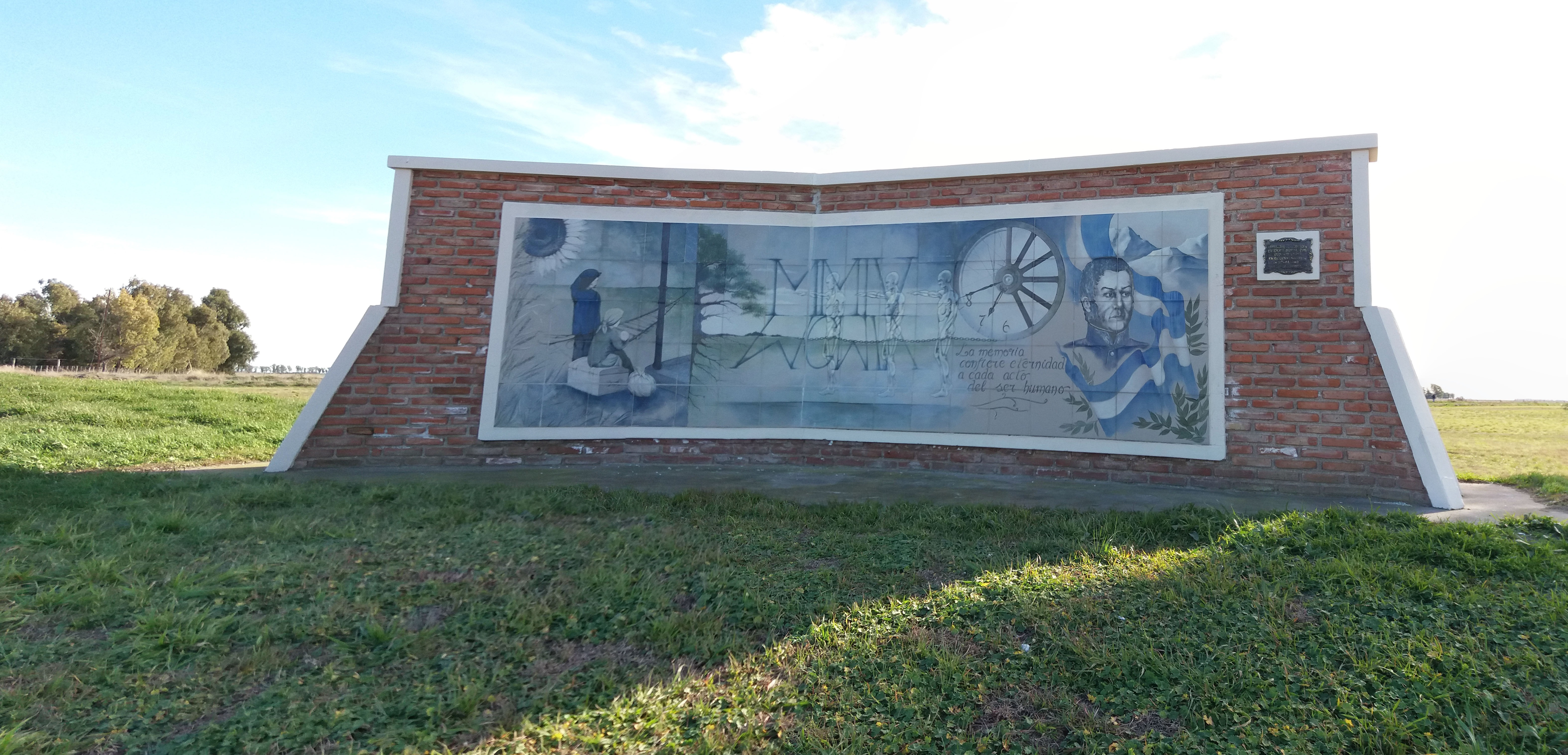 Monumento al Centenario de la fundación de la localidad (Diecisiete de Agosto, Partido de Puan, Provincia de Buenos Aires)